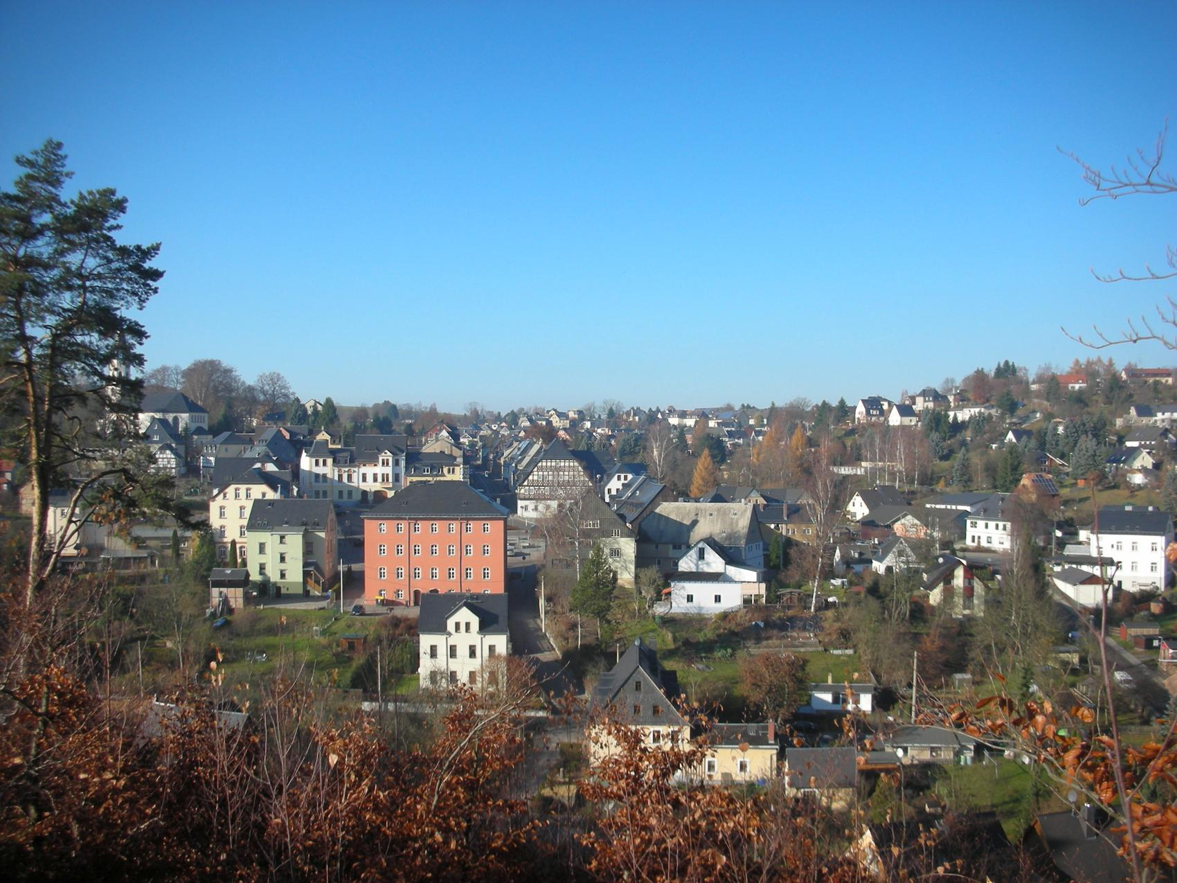 Hartenstein, Blick von der Schlossruine (rotes Gebäude - Rathaus)